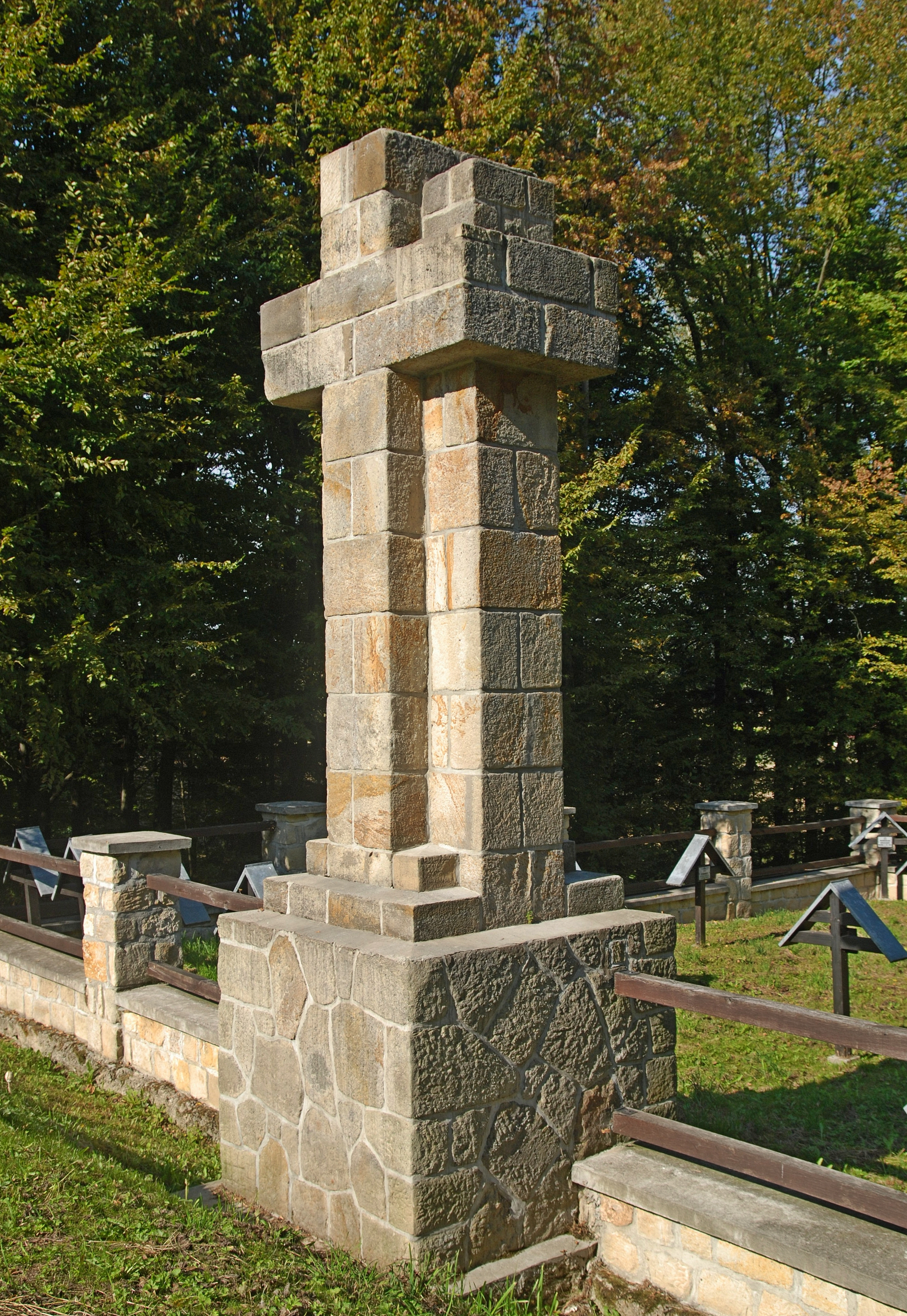 wieś Szerzyny